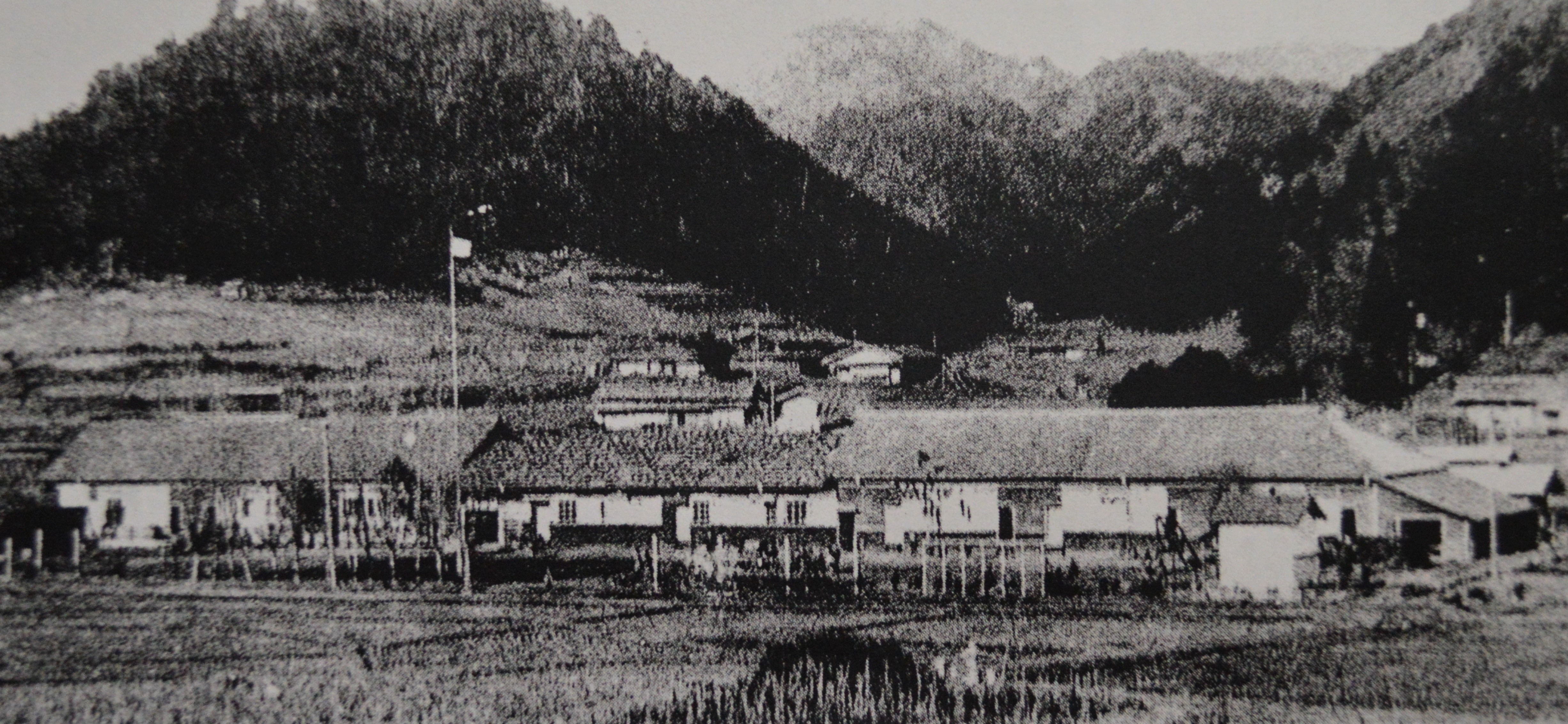 愛知県北設楽郡津具村（現・北設楽郡設楽町）の津具村立下津具小学校。